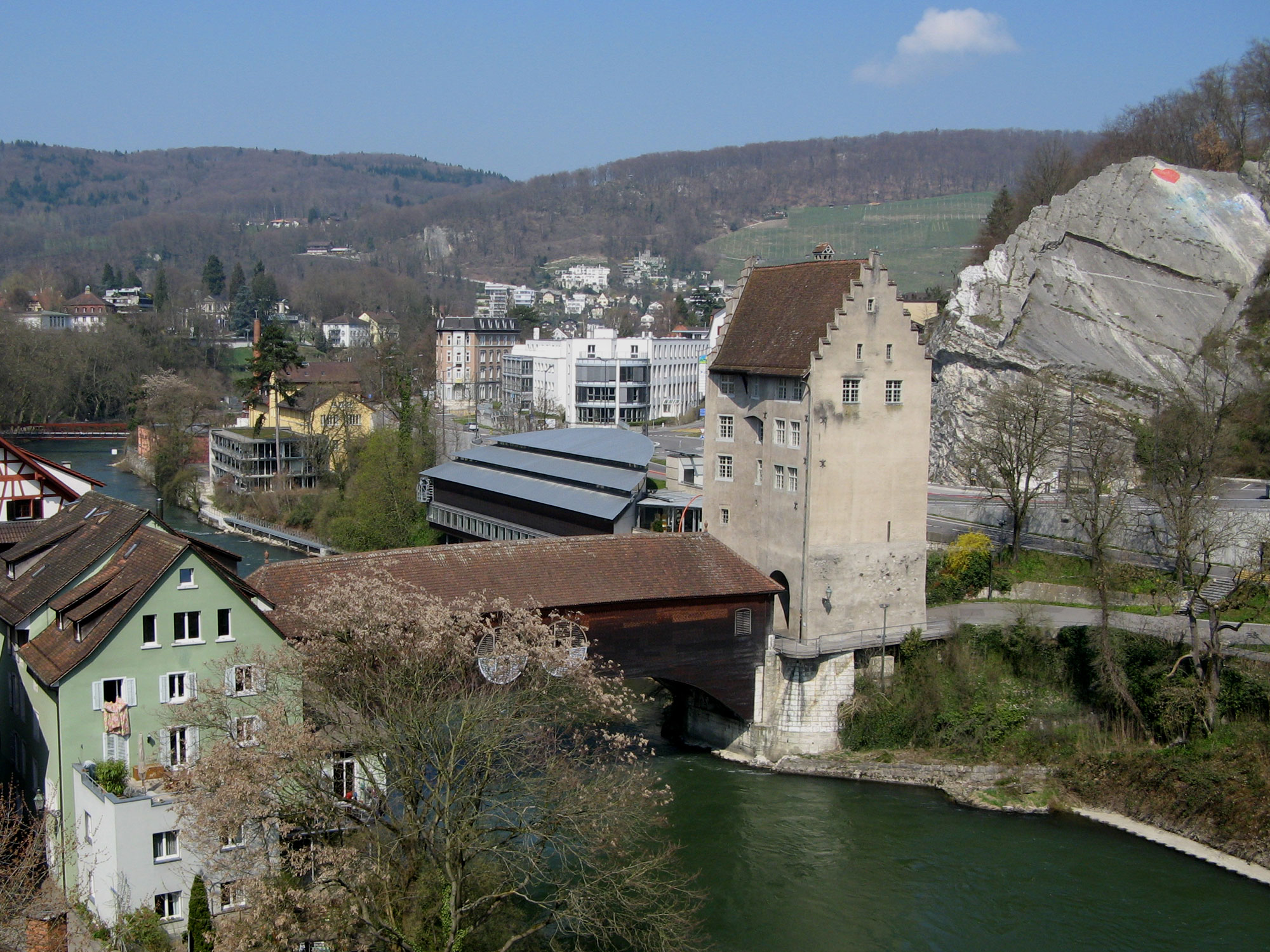 Landvogteischloss und Holzbrücke über Limmat, dahinter der moderne Erweiterungsbau des Stadtmuseums. Rechts Felsabbruch am Lägernkopf.